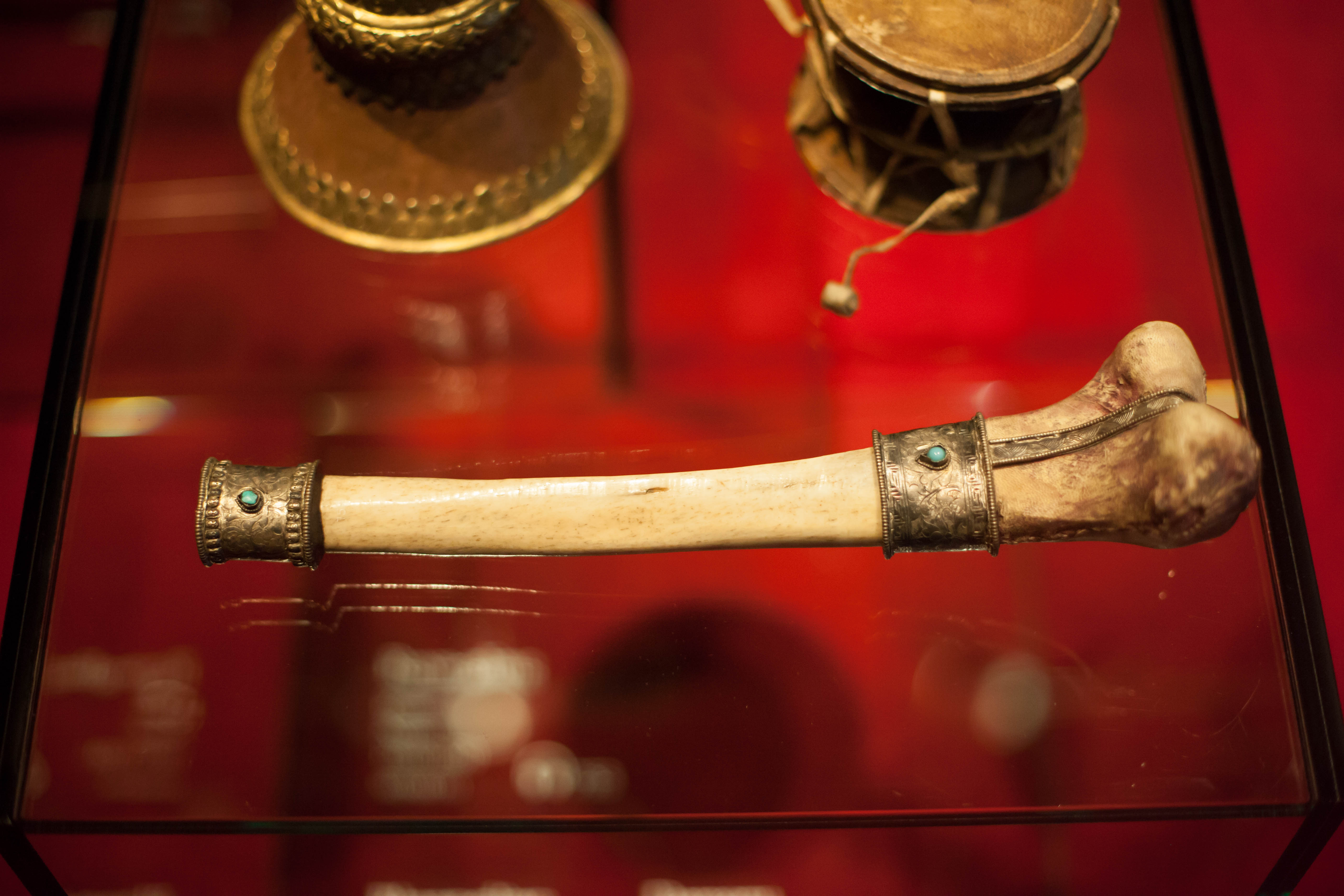 Rkang gling - Trompa o trompeta del Tibet, MDMB 757, al Museu de la Música de Barcelona References MDMB 757: rkang - gling (first half of 20th century) [aeròfon de broquet, natural]. Catalogue online. Museo de la Música de Balcelona.